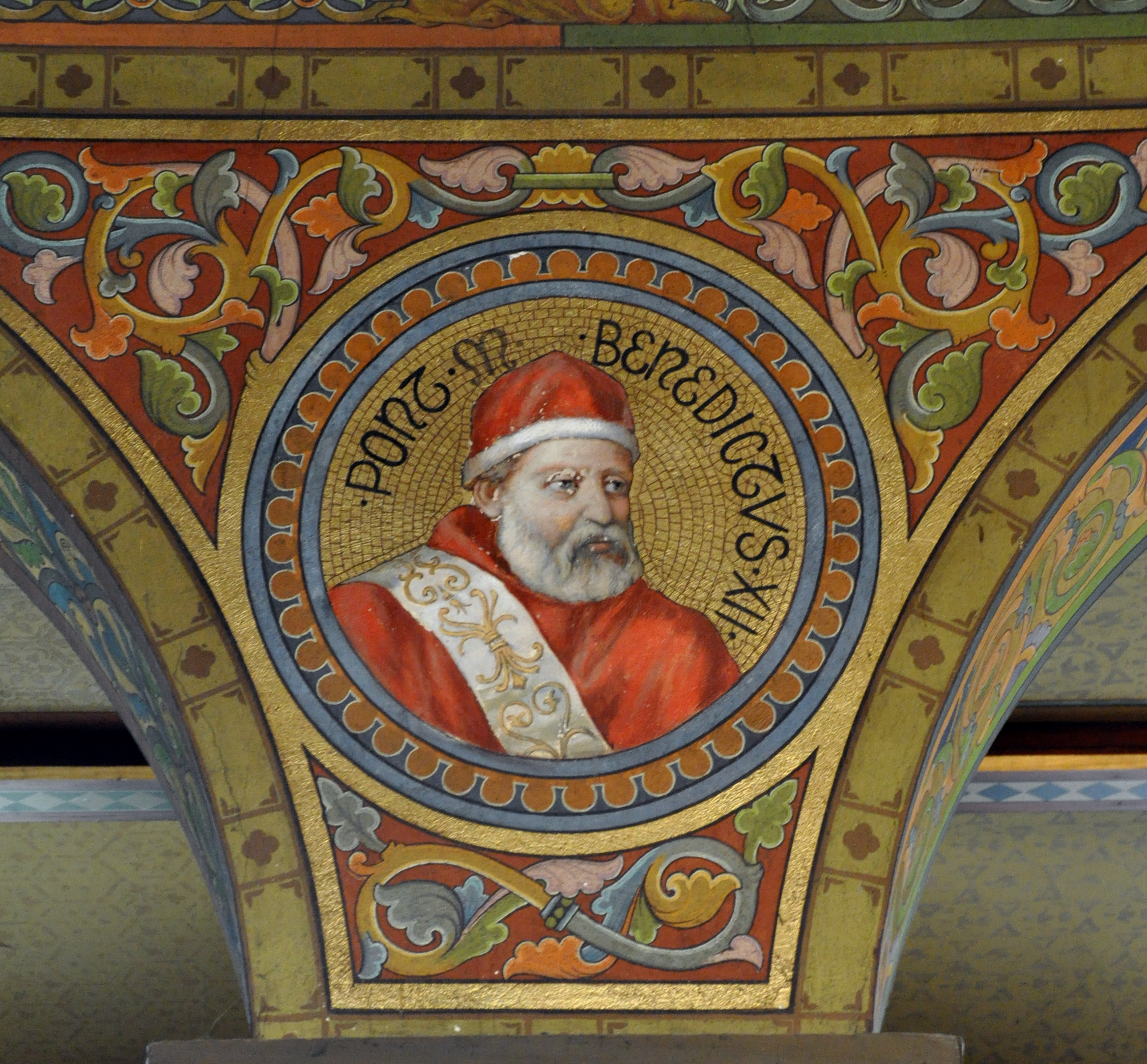 Kloster Mehrerau, Bregenz, Vorarlberg; Collegiumskapelle; Bildnisse von Päpsten (in den Arkadenzwickeln) und zugehörige Wappen; Benedikt XII.